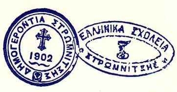 Печат на гръцкото училище в Струмица